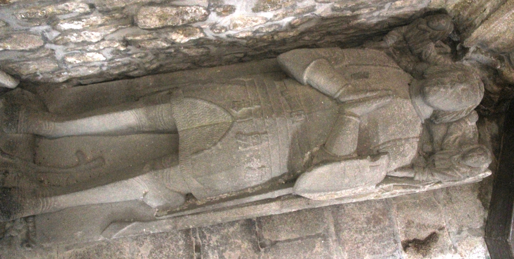 Gisant d'Alain de Tournemine, seigneur de Kermelin - église de Tréflaouénan